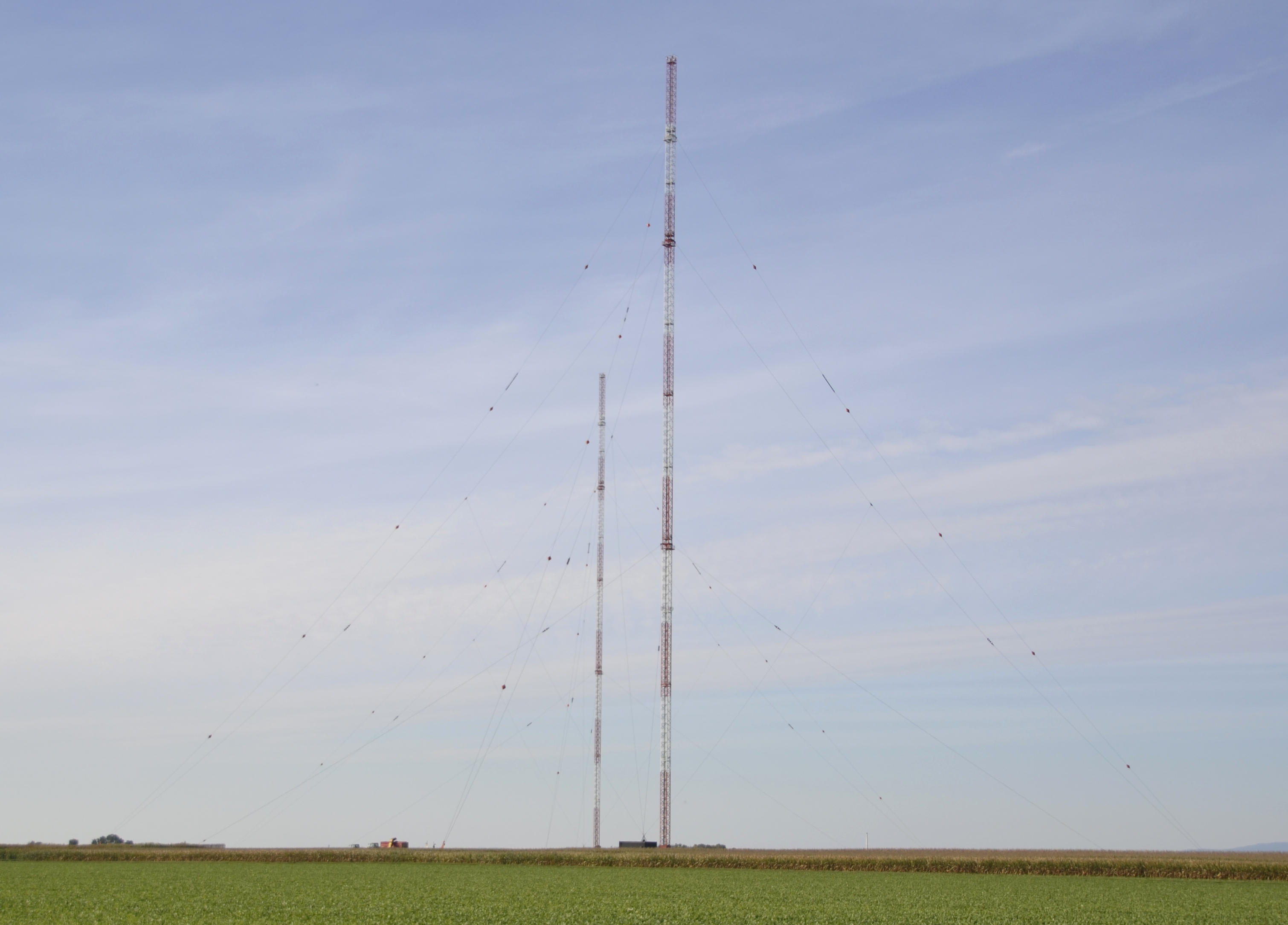 Der Langwellensender Aholming in Niederbayern.